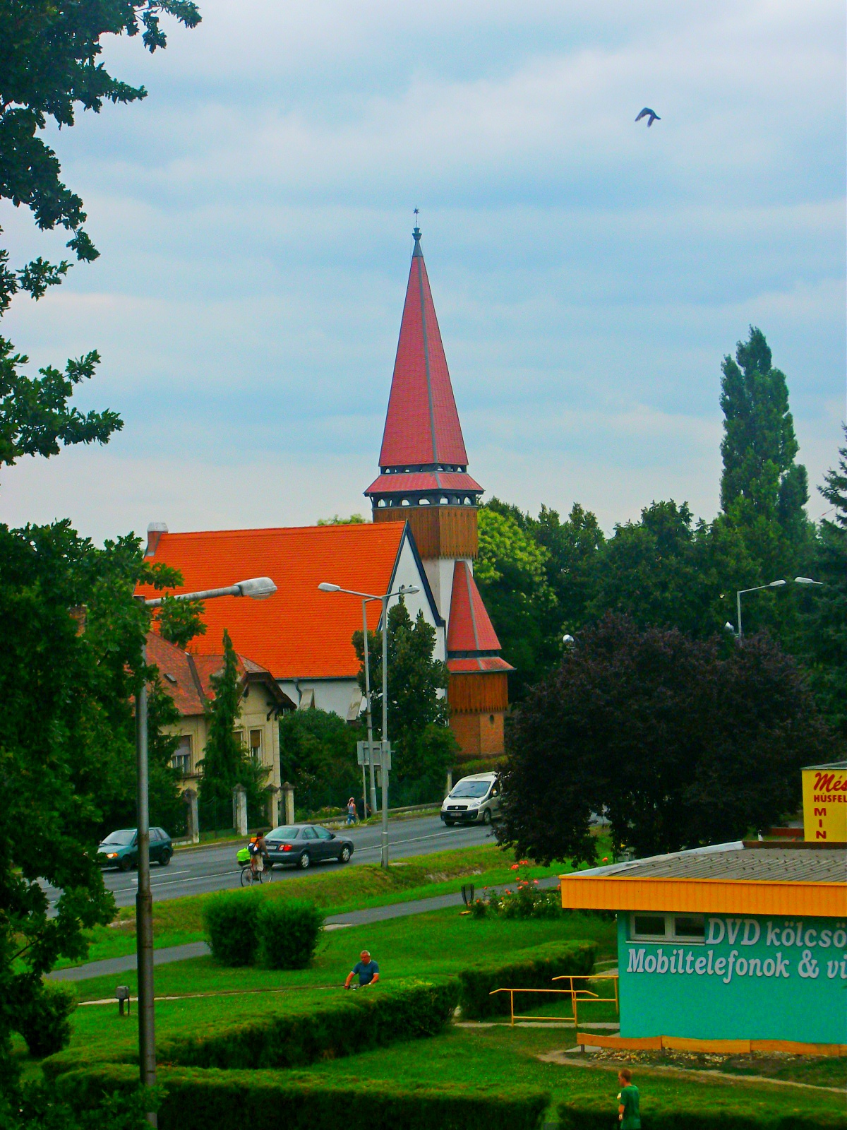 A református templom 1940-ben szentelték fel. Mosonmagyaróvár, Hunyadi utca, Szent István király út .